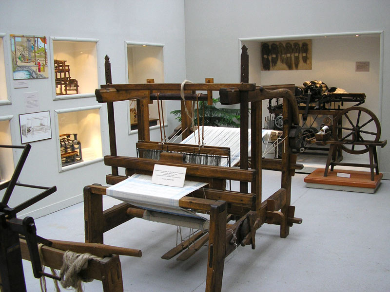 Textil-museum in Budapest, Hungary